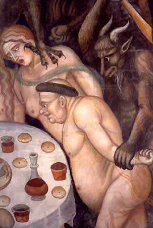 Inferno (golosi)